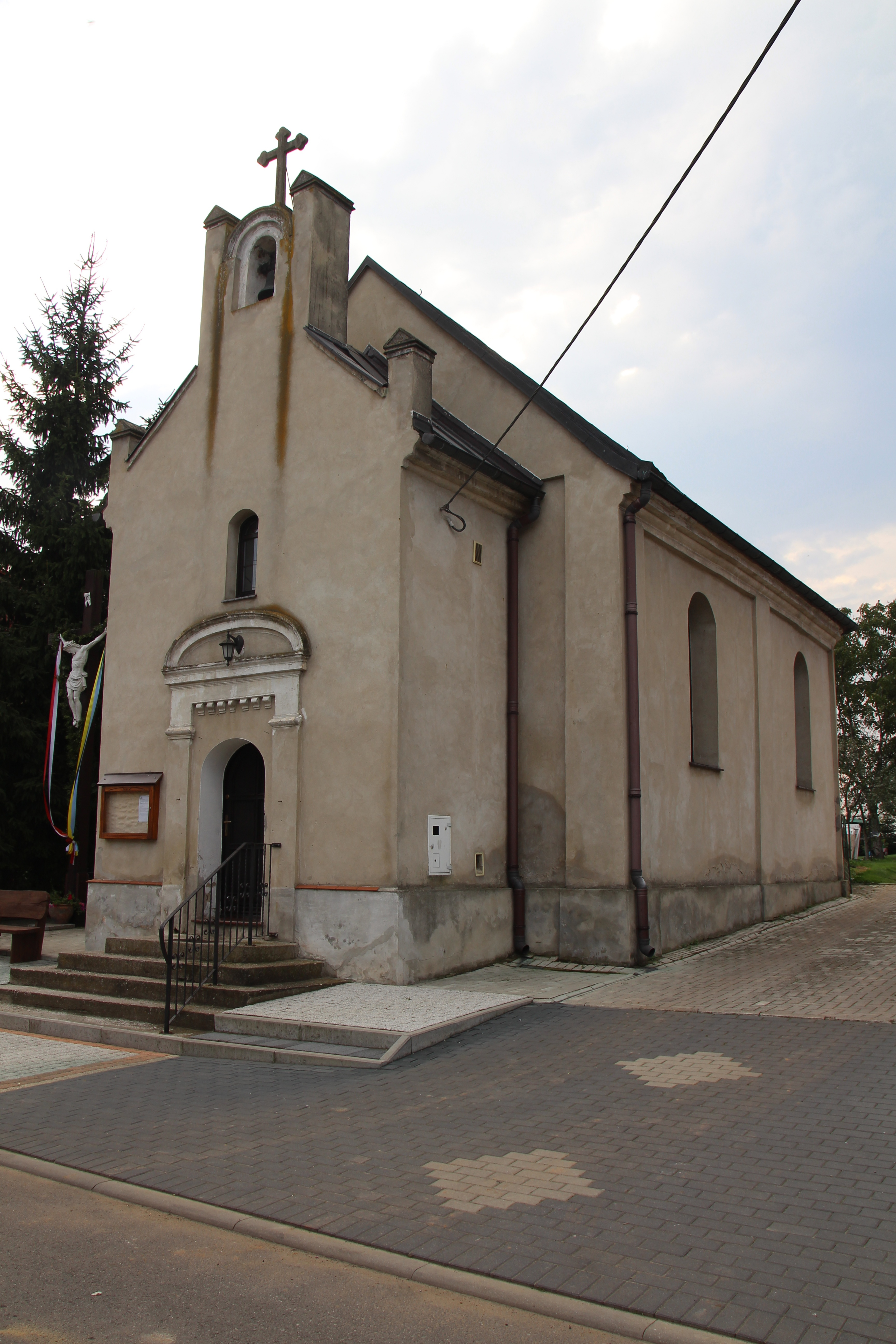 Sękowice – wieś w Polsce położona w województwie opolskim, w powiecie brzeskim, w gminie Nysa.